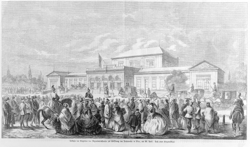 Auffahrt der Mitglieder des Abgeordnetenhauses zur Eröffnung des Reichsrates vor dem kurz zuvor errichteten Abgeordnetenhauses vor dem Schottentor.